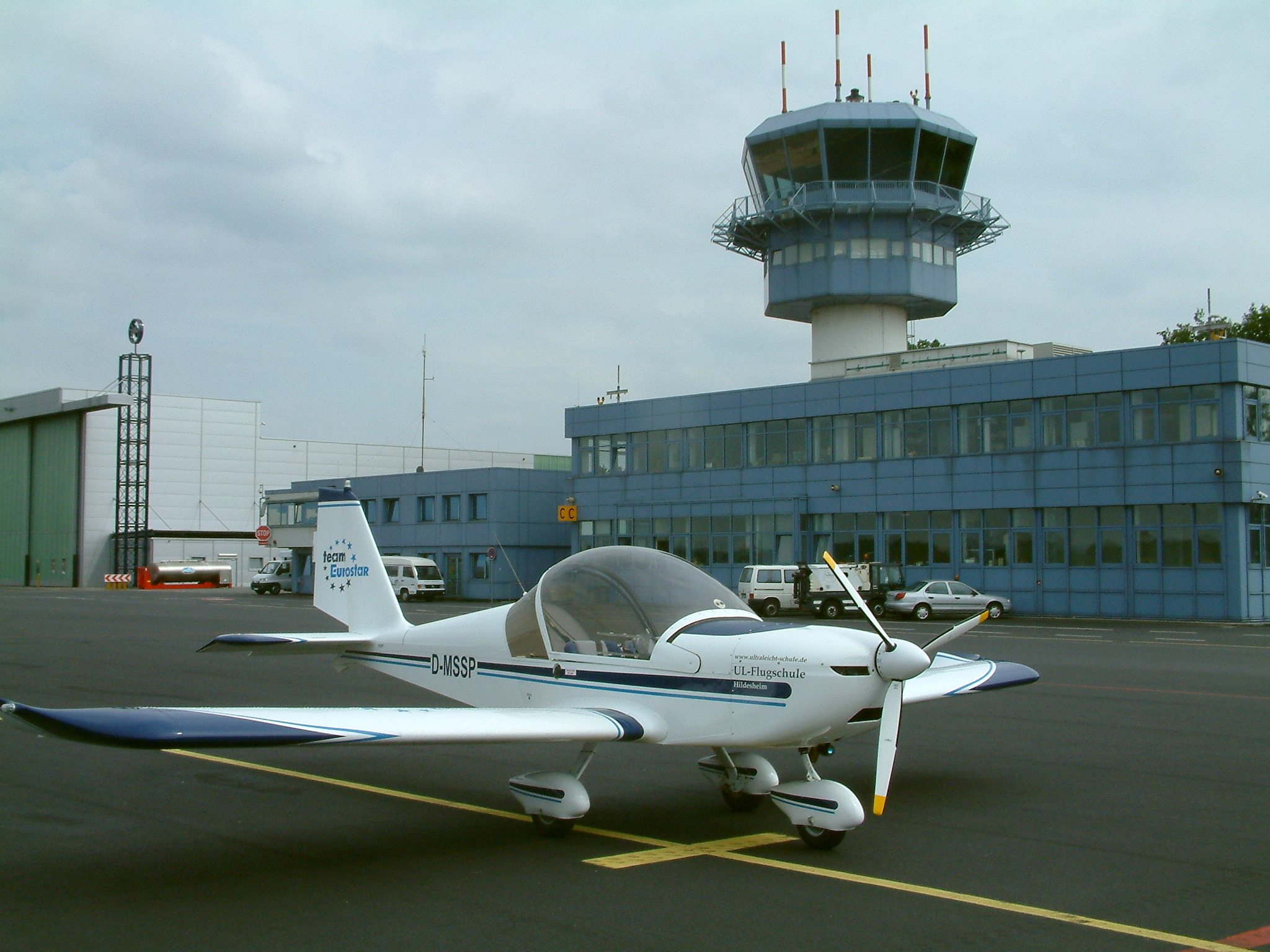 Ultraleichtflugzeug Eurostar EV97 vor dem Tower EDDG